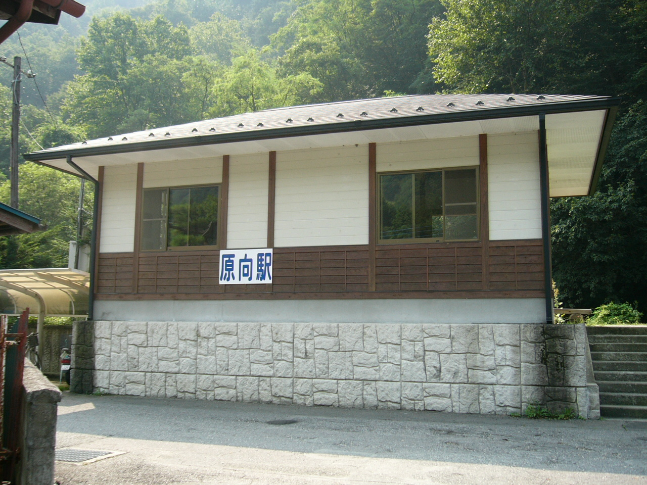 Haramuko Station